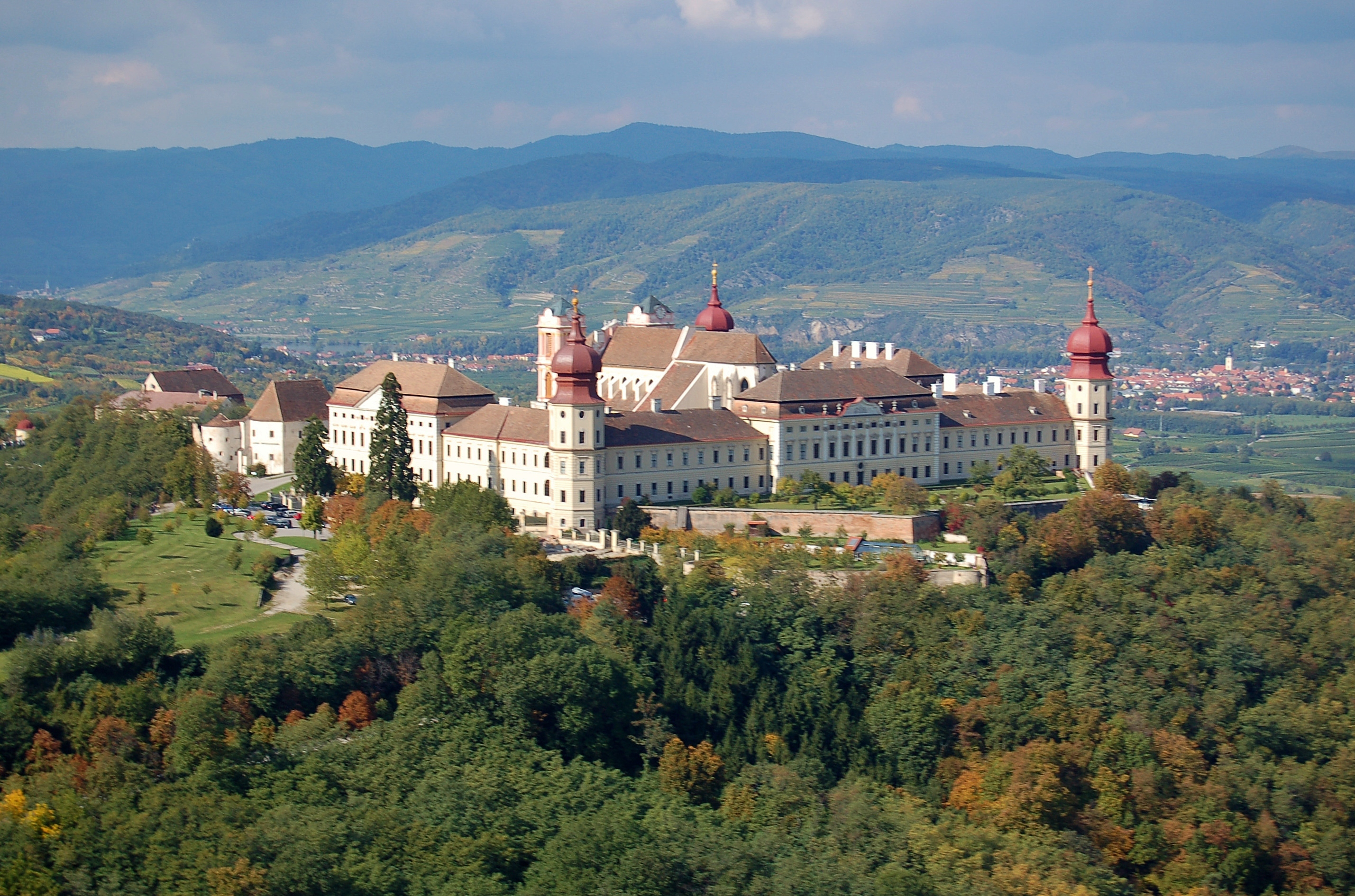 Gesamtanlage Stift Göttweig samt Vorgängerbauten, frühere Besiedlung